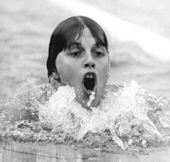 Karla Links ADN-ZB Kluge 8.7.77 ma-Leipzig: 28. DDR-Meisterschaften im Sportschwimmen-3. Tag-Neue Meisterin über 200 m Brust der Damen wurde am 8.7.77 die 17jährige DDR-Rekordhalterin Karla Links (SC Einheit Dresden). Ihre Siegerzeit: 2:38,96 min.